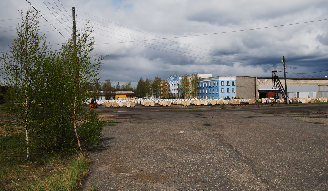 Территория завода Кирскабель с корпусом А и заводоуправлением